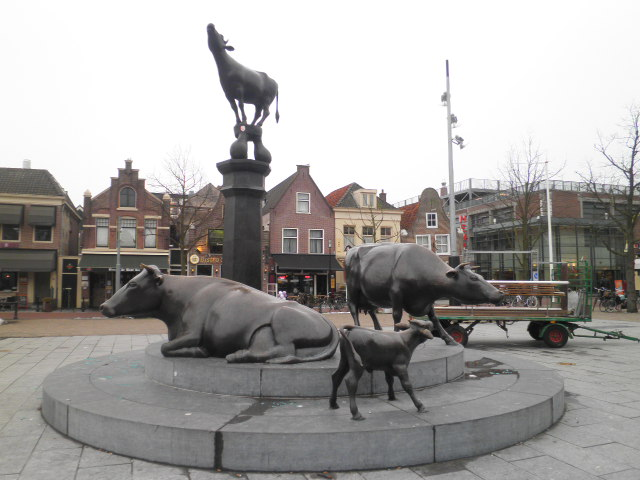 Werk: Koeien; Kunstenaar: Hans Kuyper; Jaar: 2009; Straat: Koemarkt; Materiaal: Brons